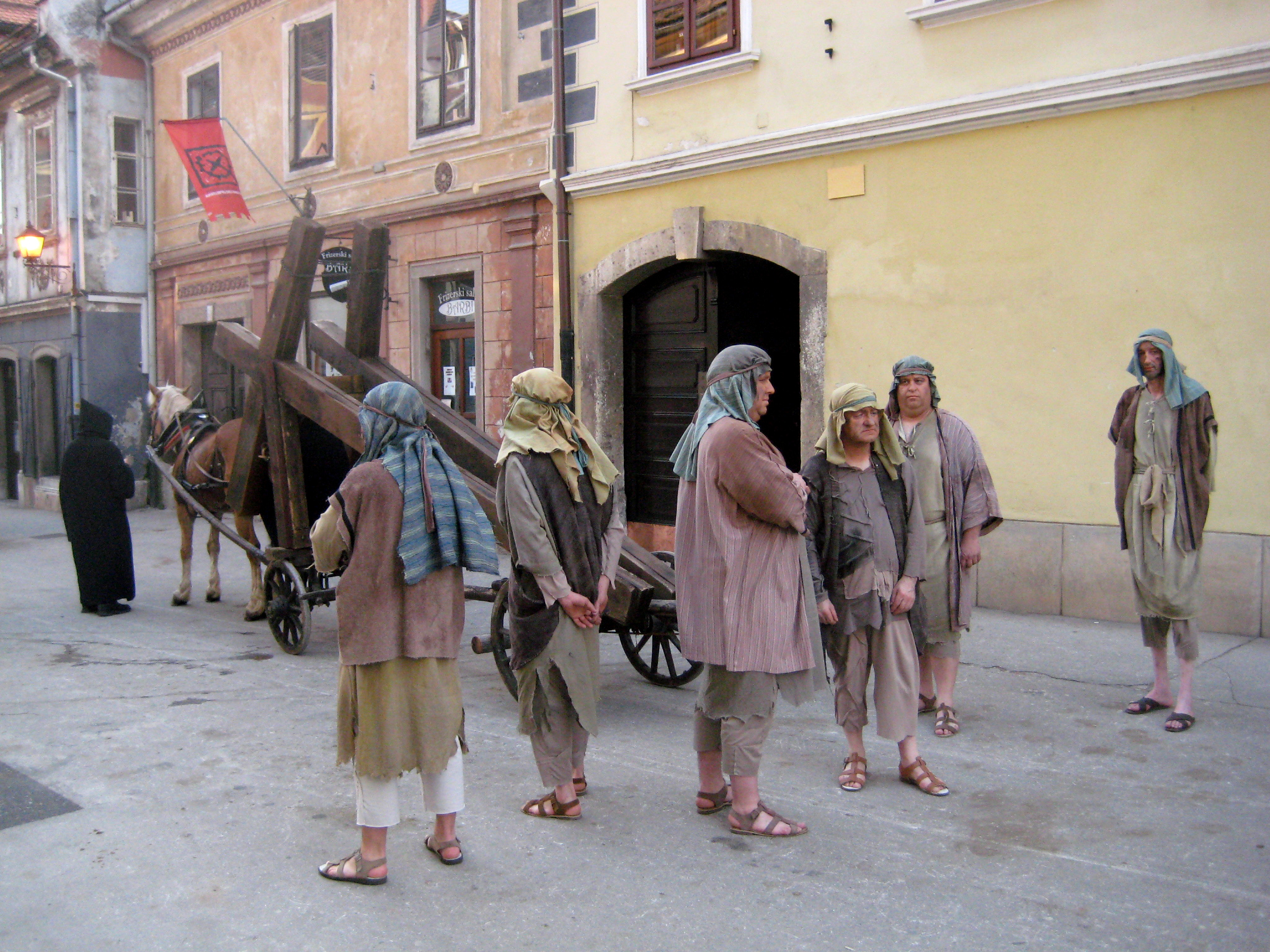 Škofjeloški pasijon (Processio Locopolitana), izvedba 2009 v Škofji Loki